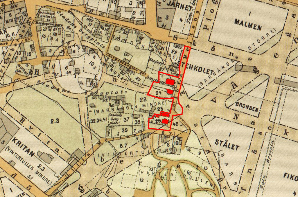 Karta över Vita bergen med planerade men ej utförda gaturegleringar. Inom röd markering: dagens fastighet Stenkolet 2. Bevarade byggnader är röd markerade.